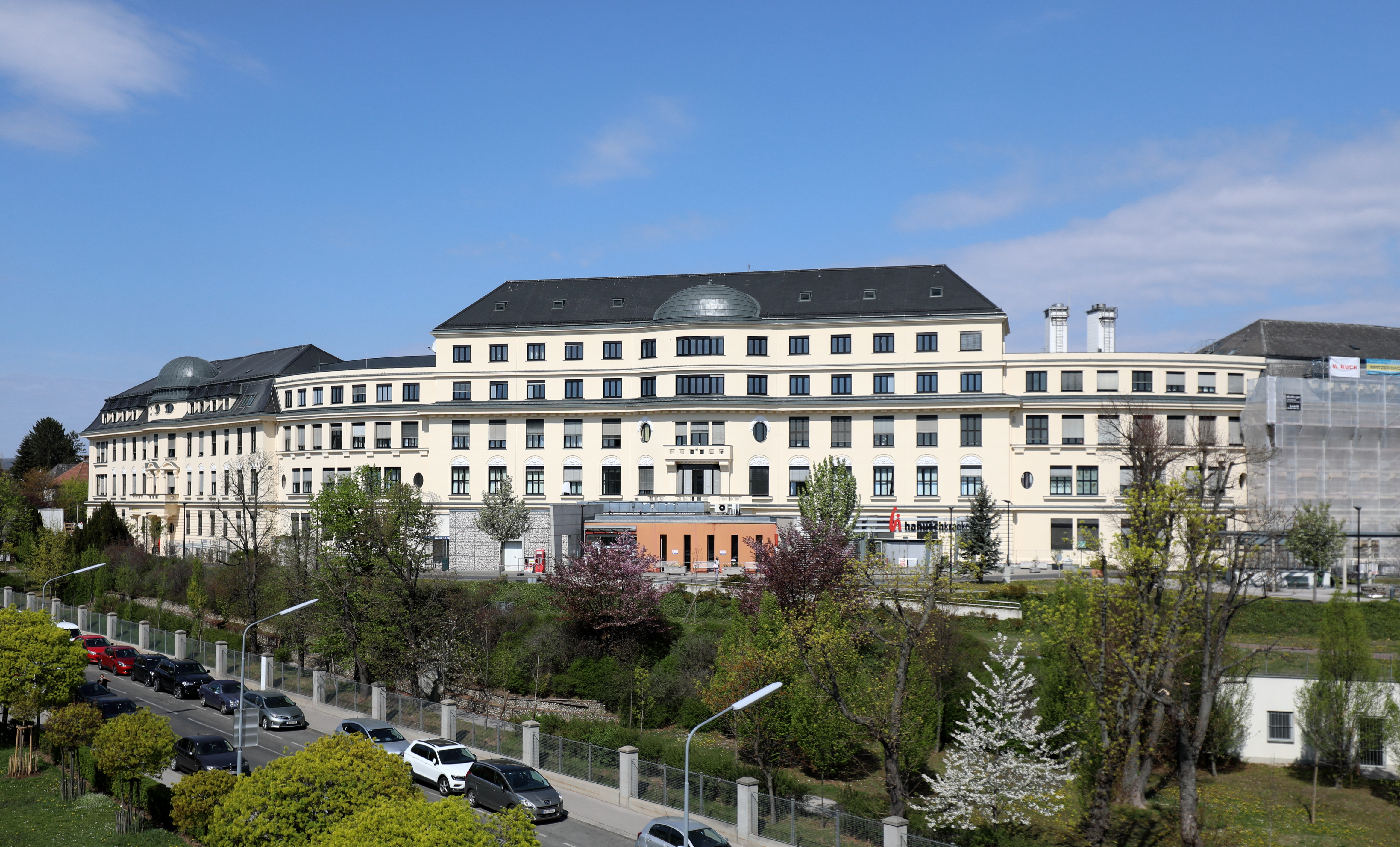 Südostansicht des Hanusch-Krankenhauses im 14. Wiener Gemeindebezirk Penzing.Als Militärspital ab 1914 nach Plänen von Hans Schmid und Hermann Aichinger durch Karl Stigler und Alois Roux errichtet und am 28. September 1915 als k. k. Erzherzog-Rainer-Militärspital feierlich eröffnet. 1945 erfolge zu Ehren des Gewerkschafters und Sozialministers der 1. Republik Ferdinand Hanusch (1866–1923) die Umbenennung in Hanusch-Krankenhaus.